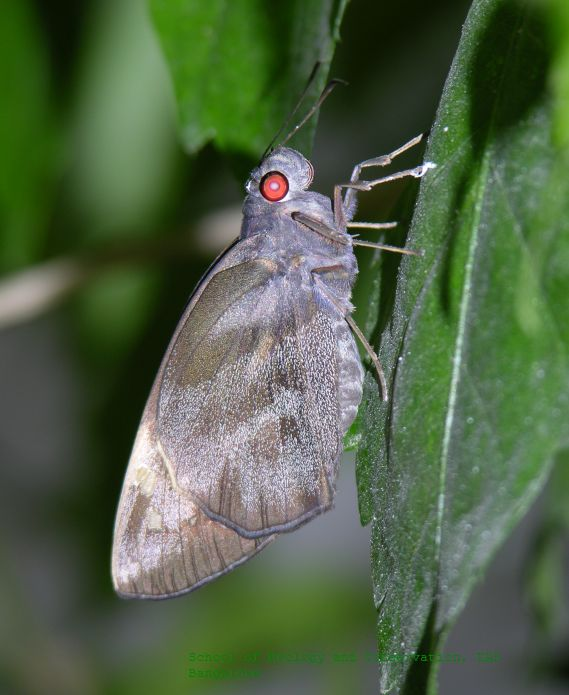 Gangara thyrsis, adult, India